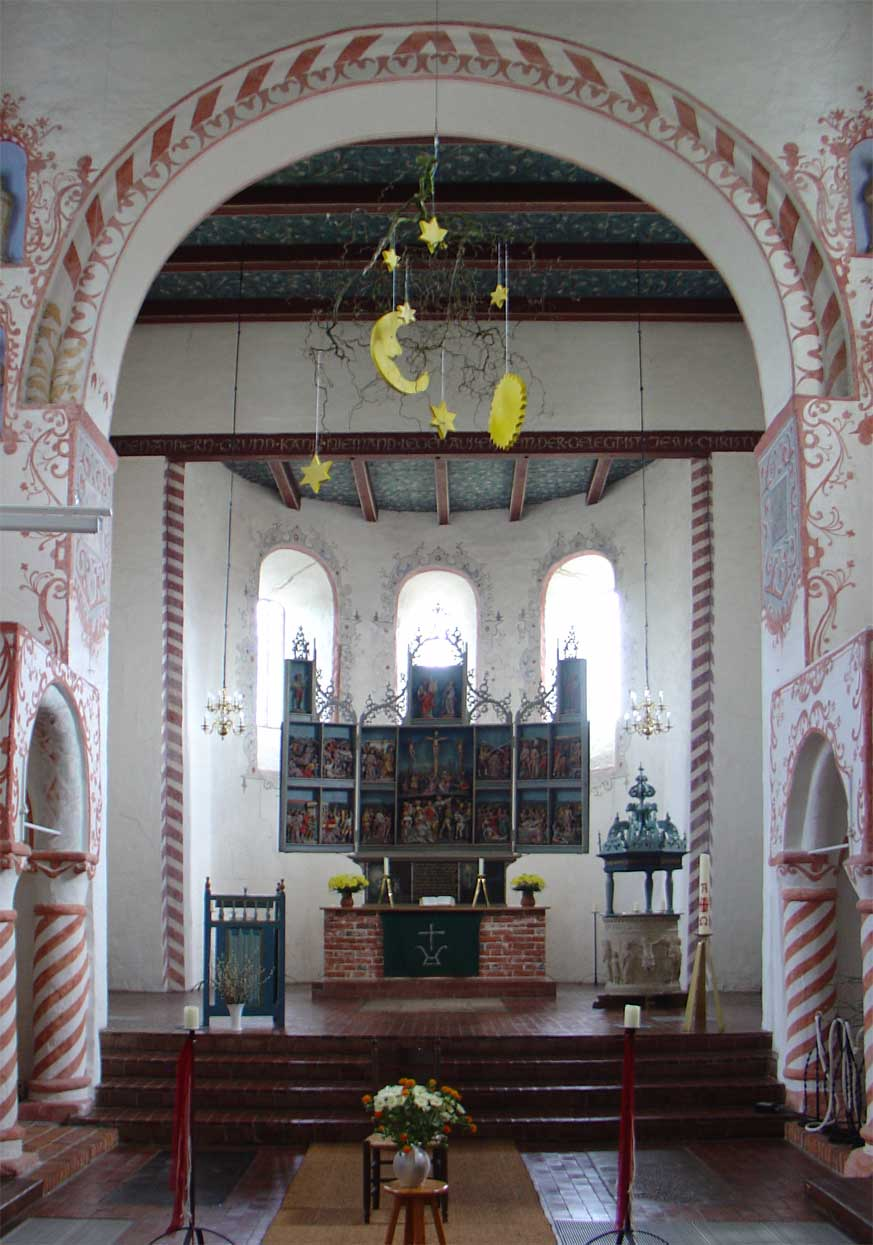 Triomfboog en cibories met zicht op het retabel in de Florianuskerk Sillenstede (detail)